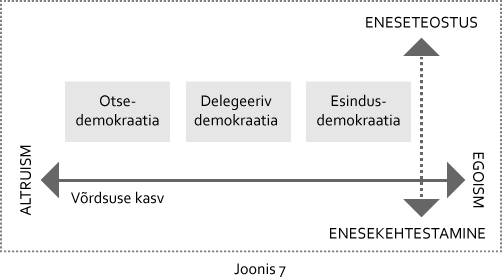 Diagramm, mis paigutab demokraatliku osaluse vormid võrdsuse teljele.